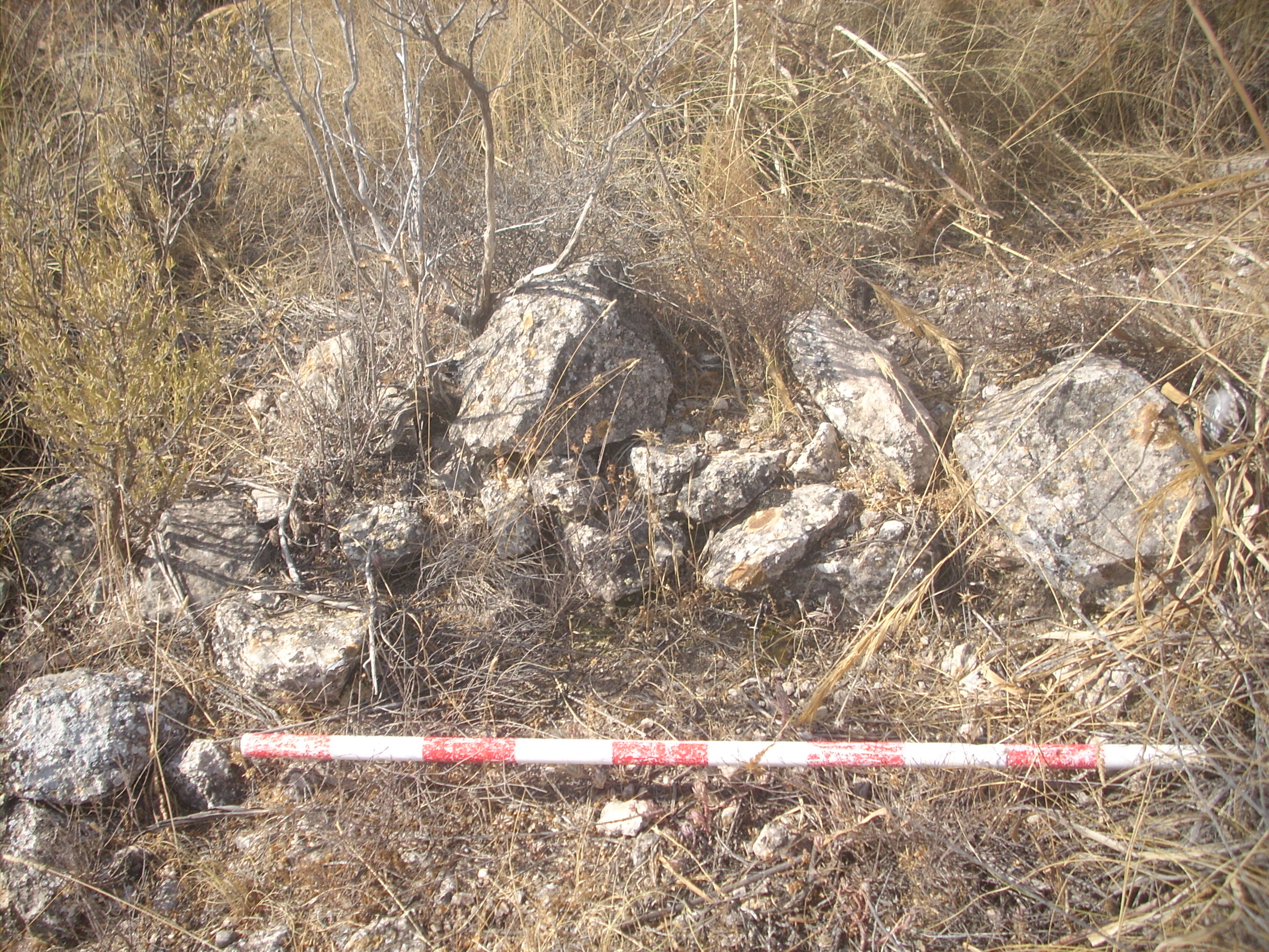 Restos de una muro en el yacimiento arqueológico Peñas de Béjar